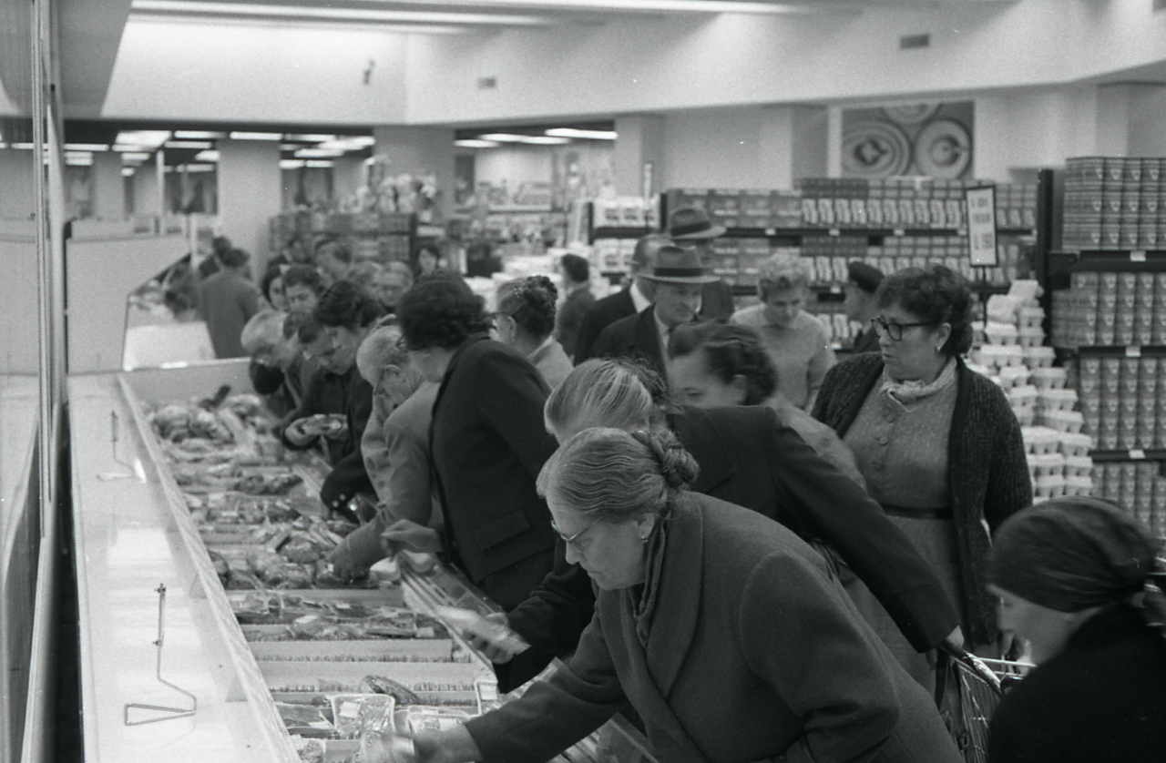 Servizio fotografico : Reggio nell'Emilia, 1963 / Paolo Monti. - Strisce: 6, Fotogrammi complessivi: 36 : Negativo b/n, gelatina bromuro d'argento/ pellicola ; 35 mm. - ((I fotogrammi hanno una doppia numerazione. - Occasione: Inaugurazione Coop a Reggio Emilia. - Fonte: Agenda di Paolo Monti: Foto Leica 1 / 1-51 verde, 1-110 nera (1958-1963), presso Archivio Paolo Monti